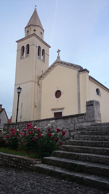 Kościół pw. św. Bernarda w Funtanie